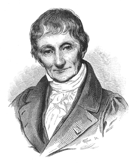 Portrait d'Alexandre Brongniart (1770-1847), fondateur du Musée national de céramique (Sèvres)